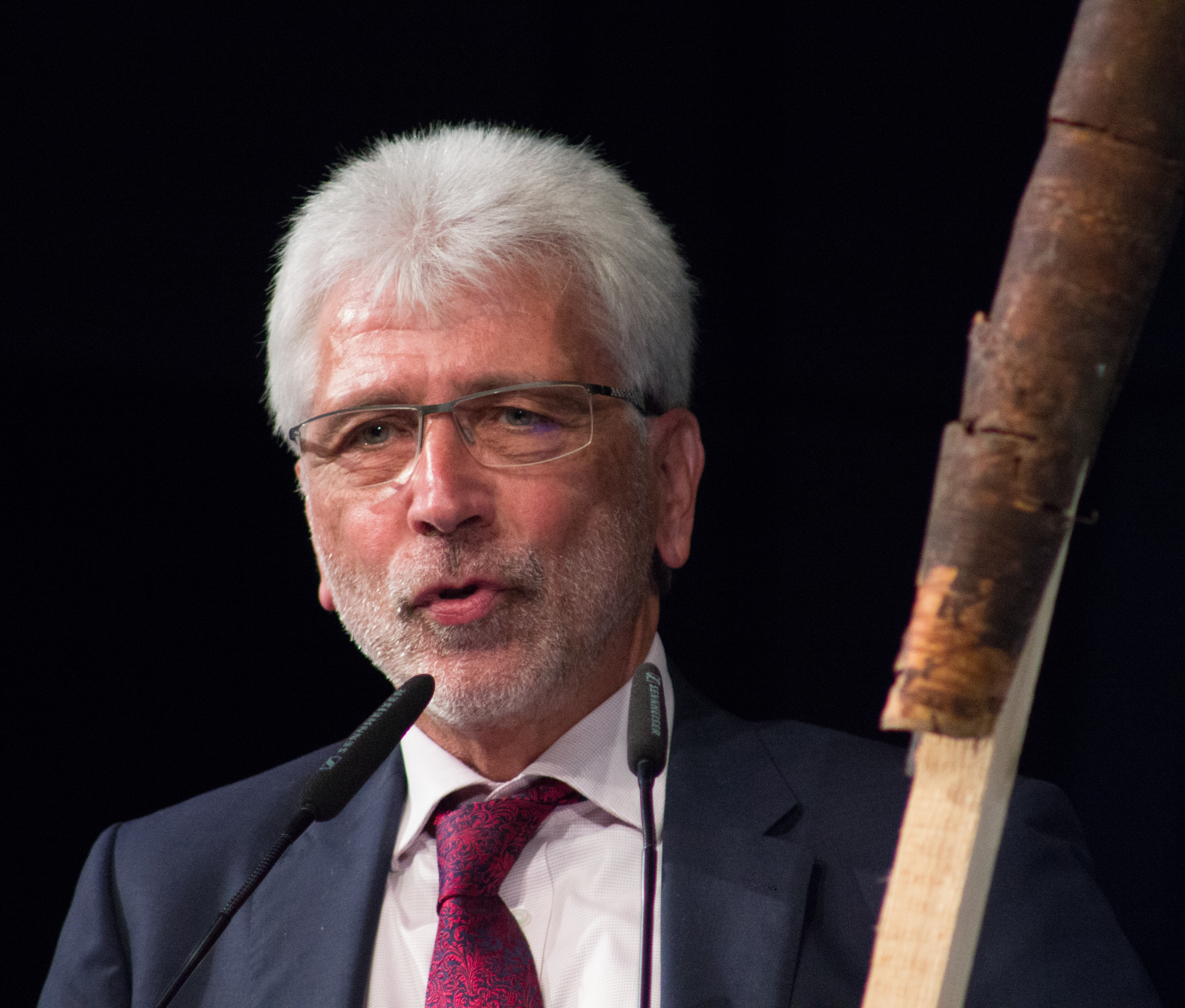 Documenta 14 in Kassel: Bertram Hilgen im Rahmen der Eröffnungskonferenz der Documenta 14 am 7. Juni 2017 in Kassel